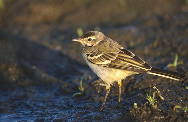 Motacilla flava, young